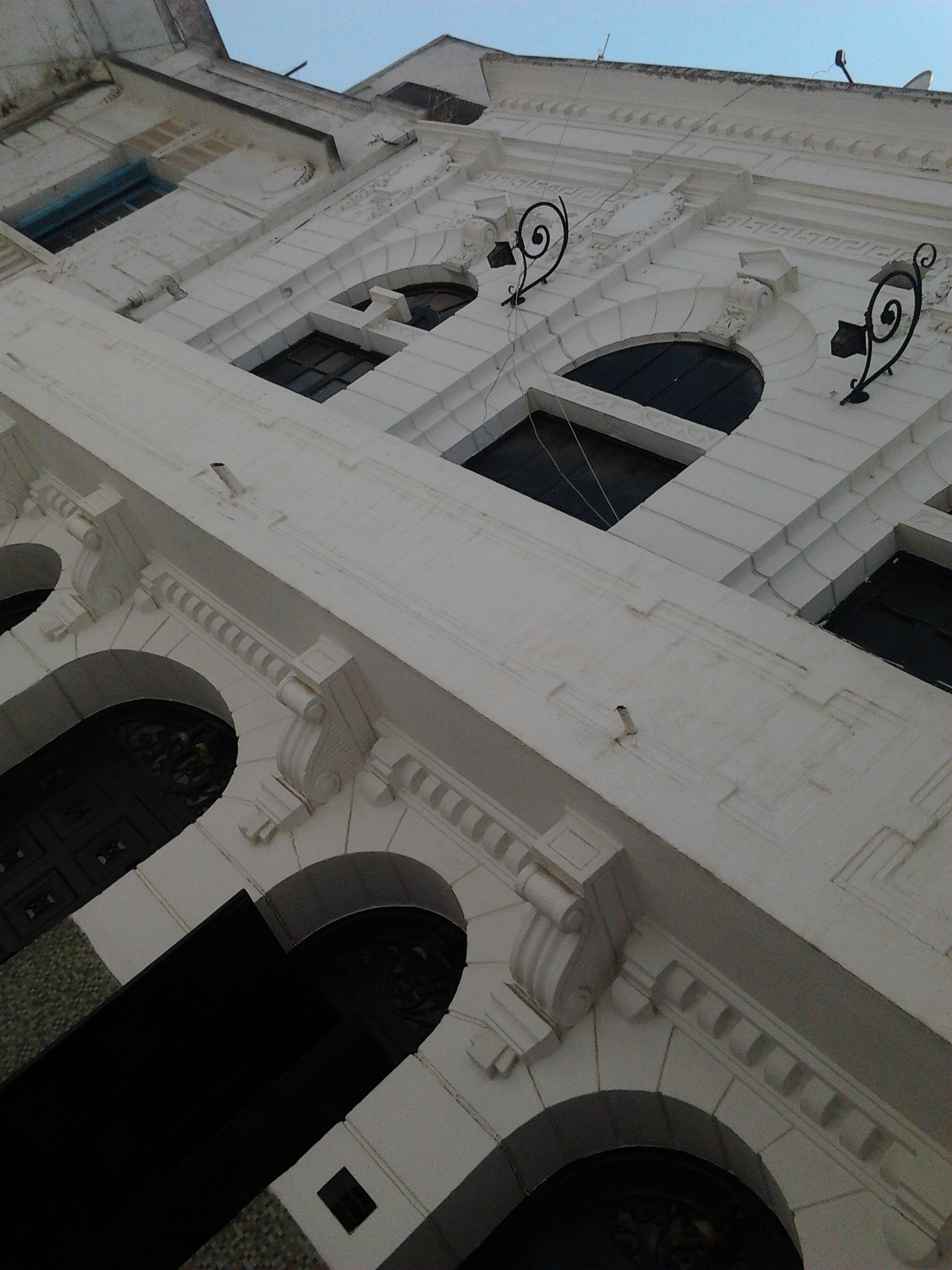 Théâtre "Al Hamra" (Alhambra) - Bab Al Jazira - Al Khirba - Tunis